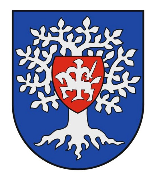 Lietuvos genealogijos ir heraldikos draugijos herbas, 2019, autorius Arvydas Stanislavas Každailis